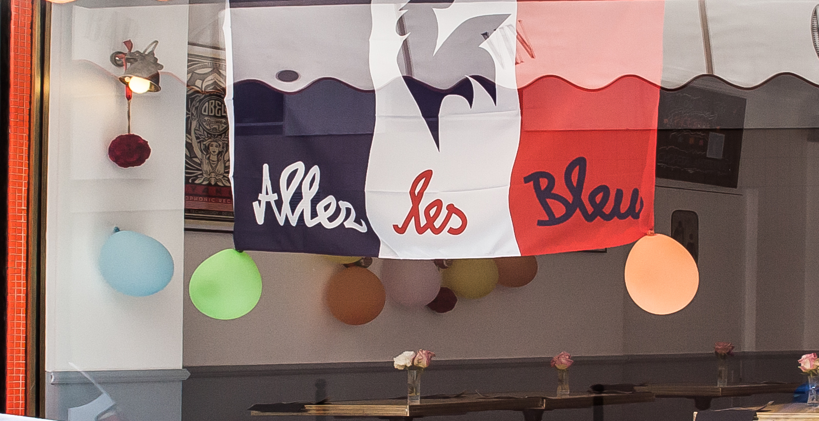 Drapeau de la France avec un coq et la mention Allez les bleus.